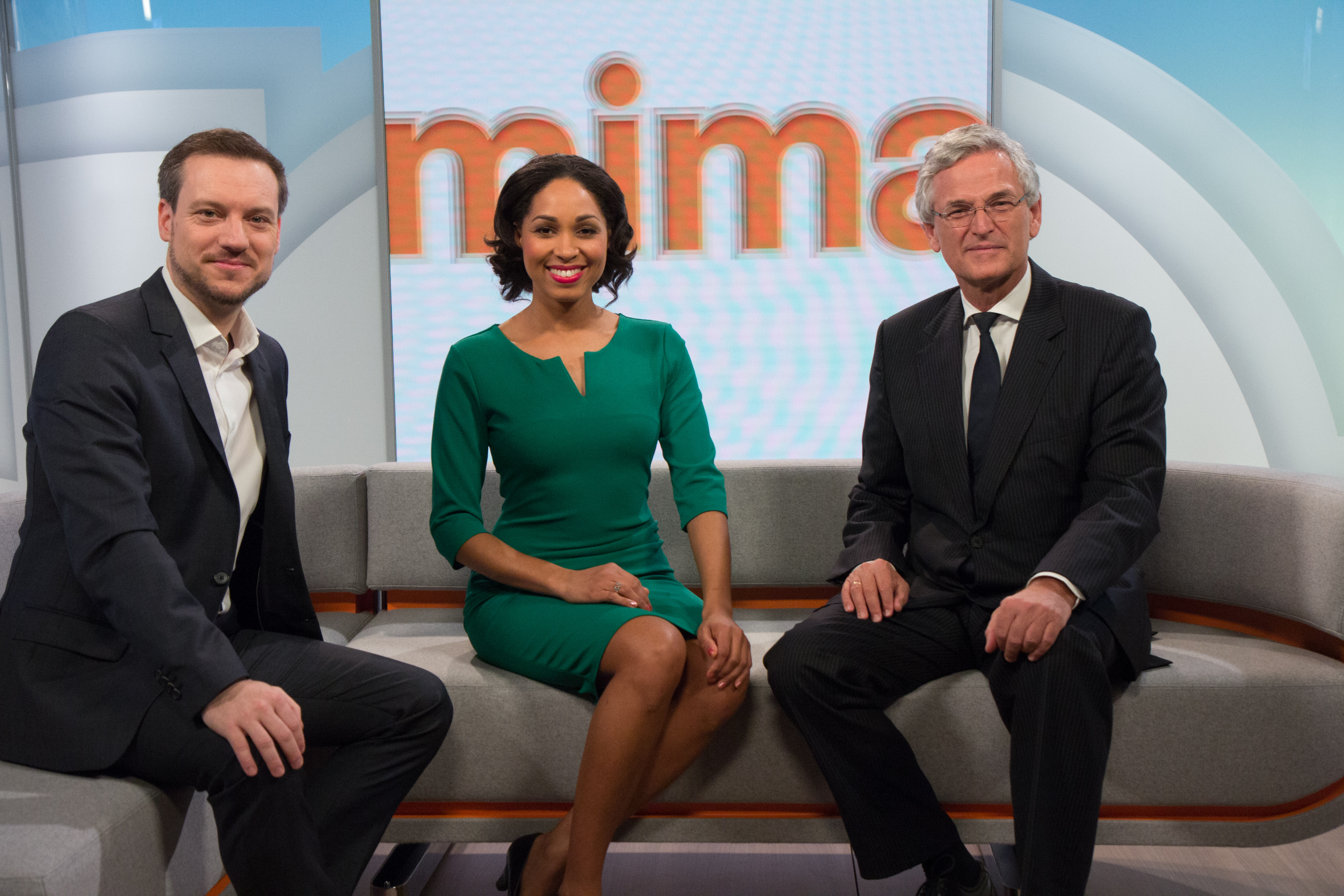 Pressetermin des ZDF zum ZDF-Mittagsmagazin in der neuen Studiokulisse mit ZDF-Chefredakteur Peter Frey, Andreas Wunn, Leiter der neuen ZDF-Redaktion Tagesmagazine Berlin sowie der neuen "ZDF-Mittagsmagazin"-Moderatorin Jana Pareigis.